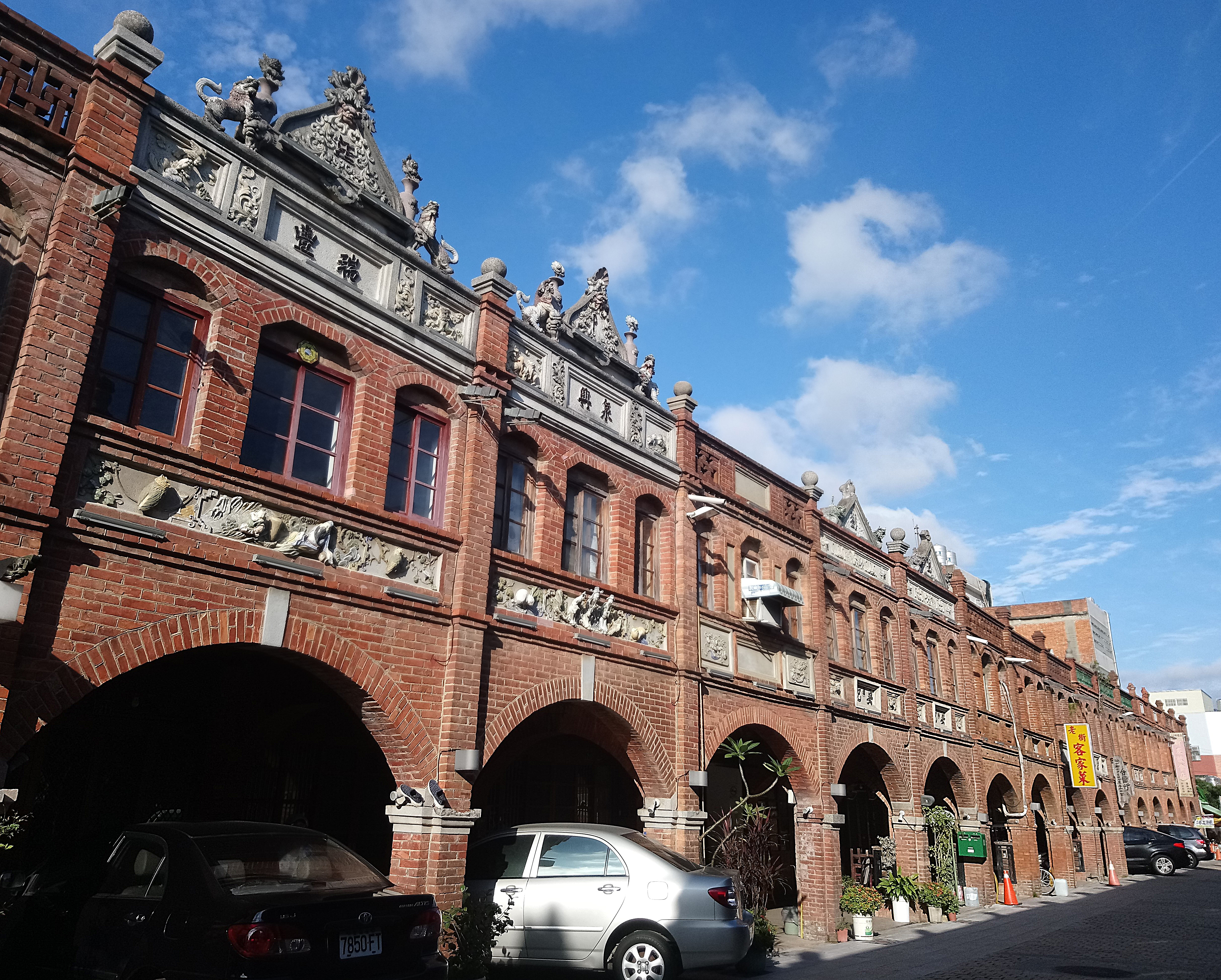 湖口老街豐瑞（左一）與興泉（左二）,新竹縣湖口鄉湖鏡村